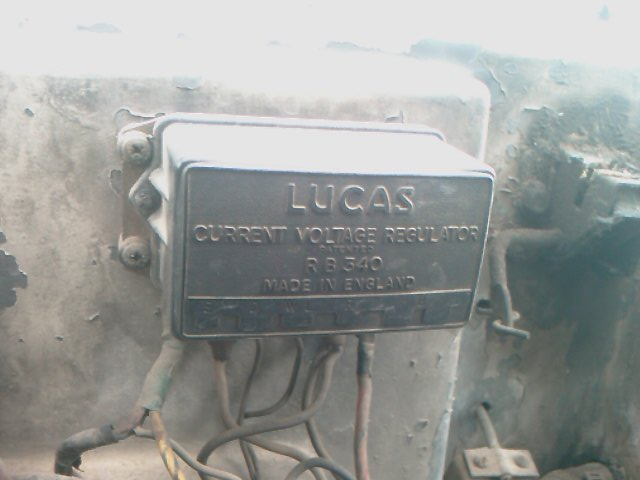 Türkiye'de seri olarak üretilen ilk otomobil markası Anadol'dan bir görünüm.